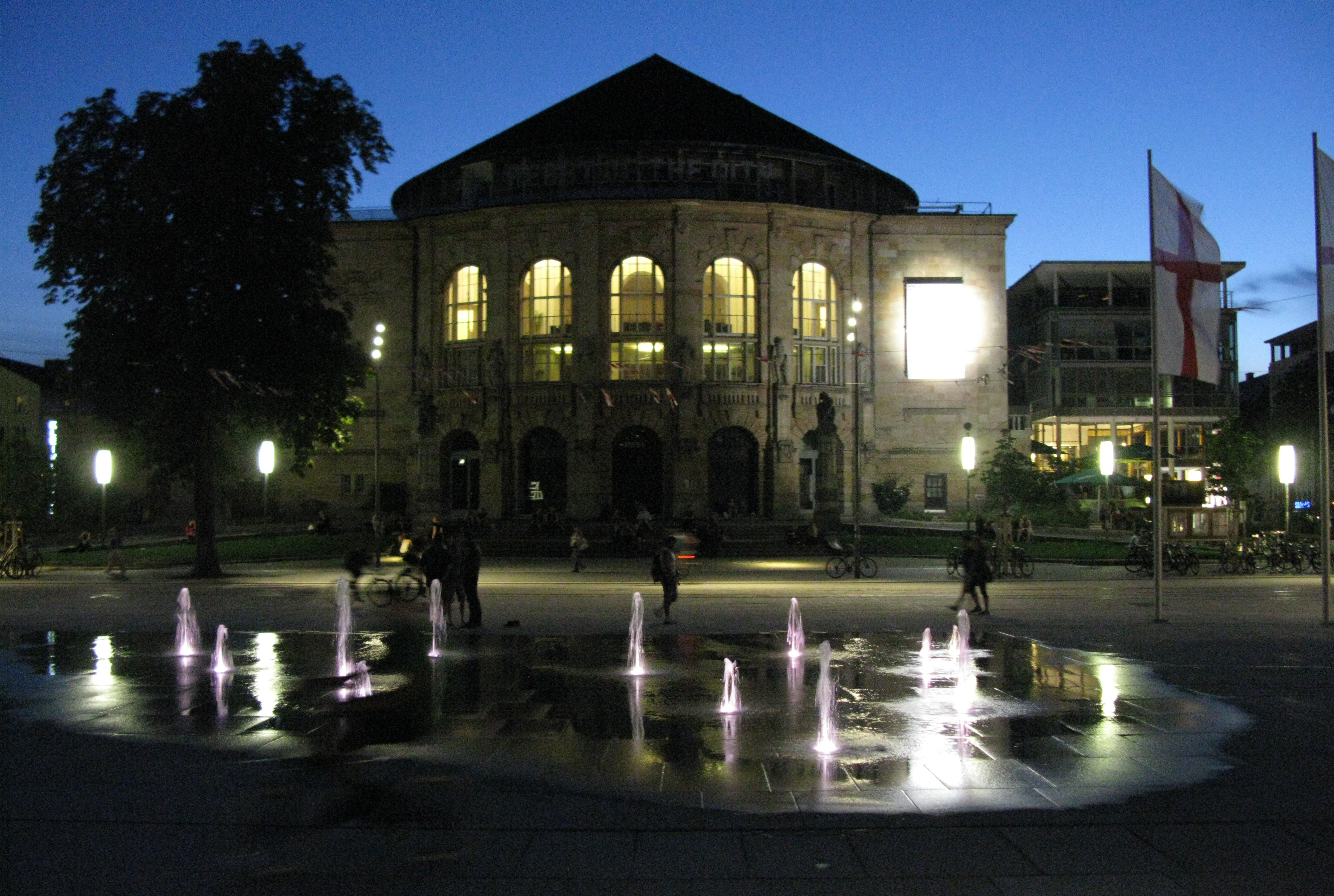 Freiburger Stadttheater mit Fontänen auf dem Platz der Alten Synagoge